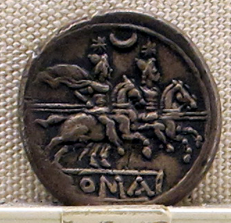 Palazzo Massimo alle Terme